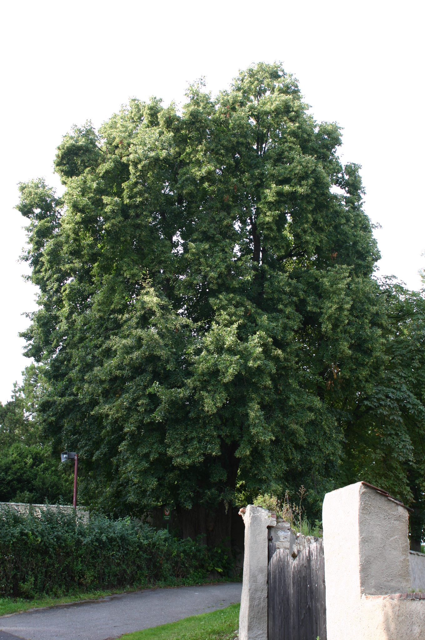 Chráněná lípa v Lužicích u Mostu